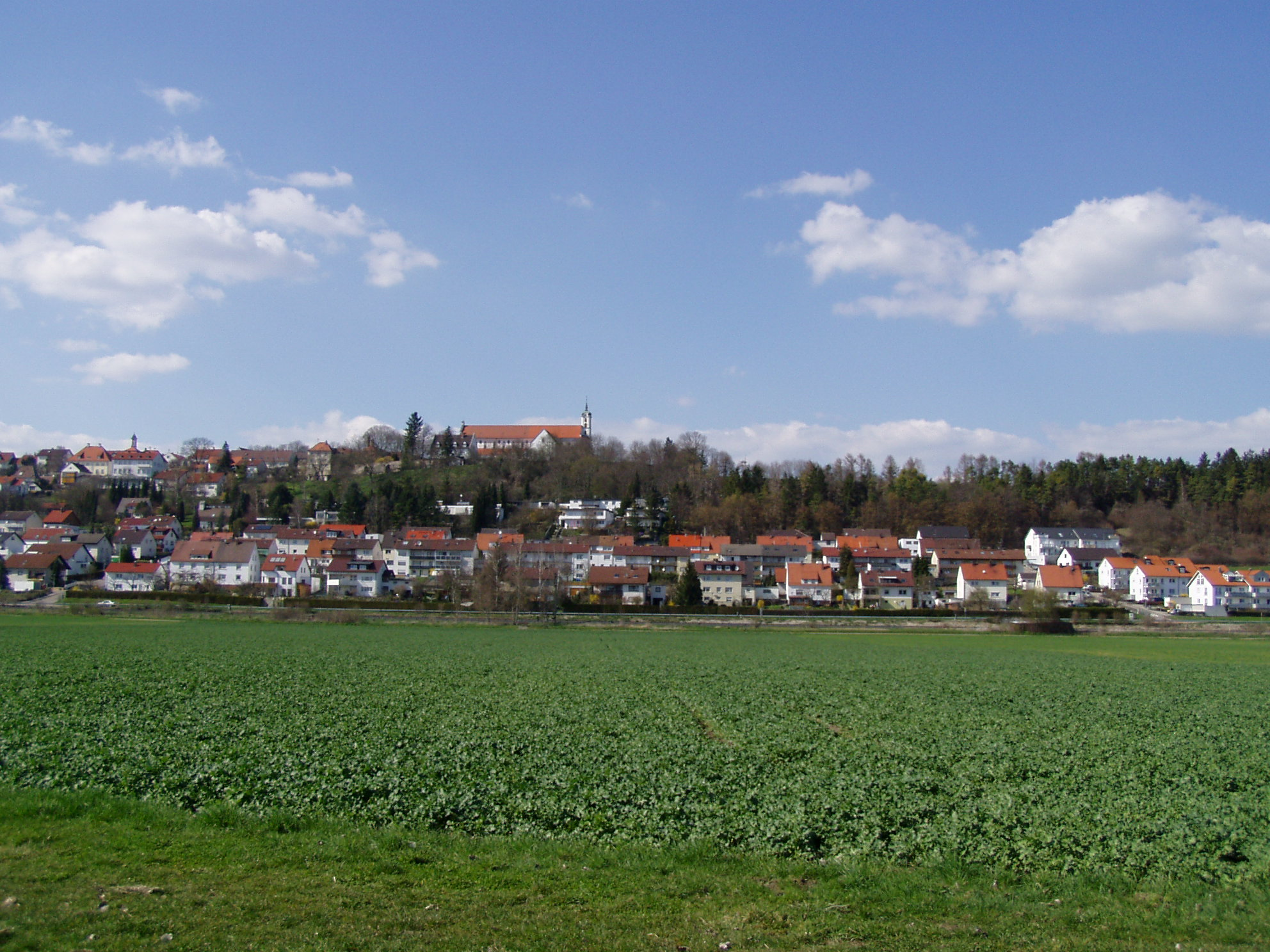 Oberelchingen, Lkr Neu-Ulm